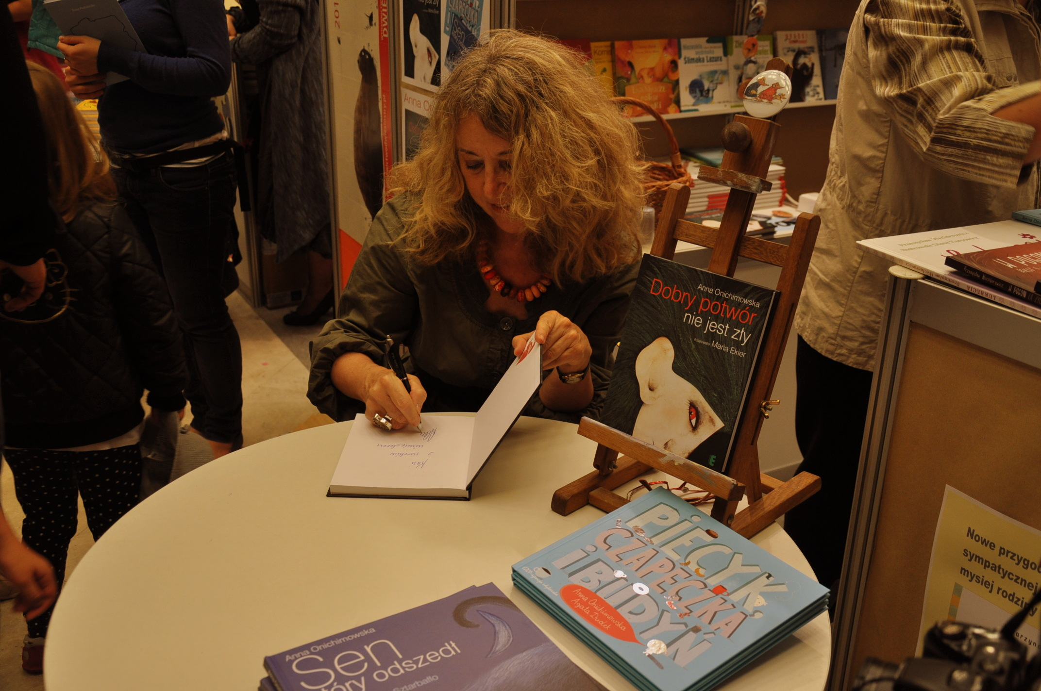 Anna Onichimowska podpisuje swoje książki na III Warszawskich Targach Książki